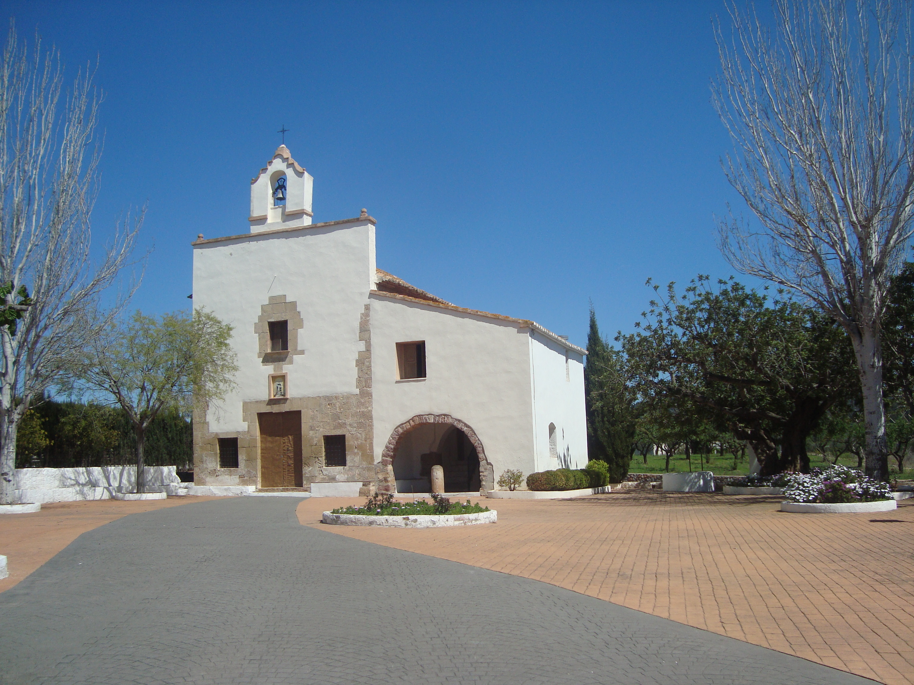 Ermita de Sant Vicent Ferrer (Borriol) 05.031-002.